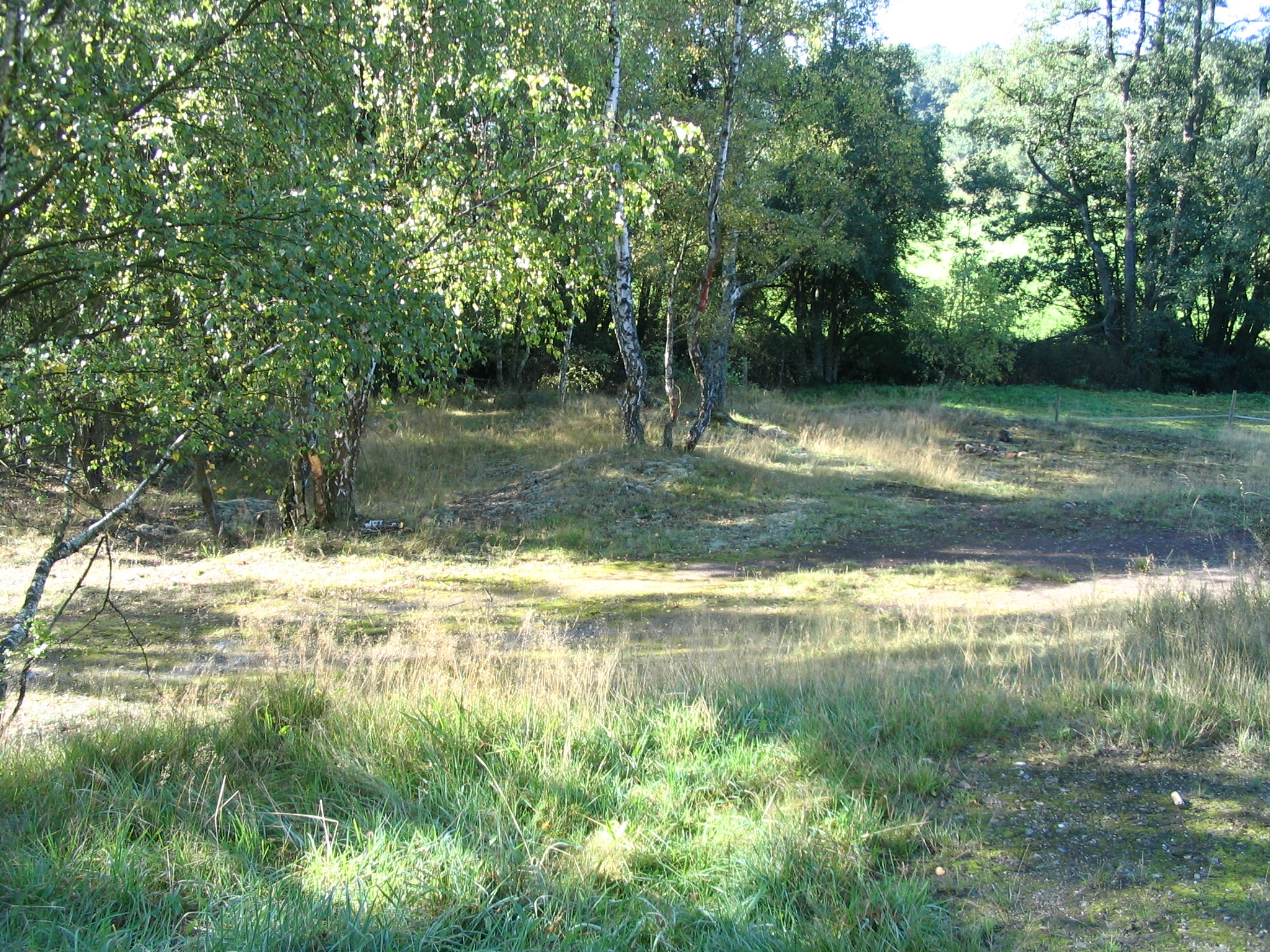 Abraumhalde Silberschmelze